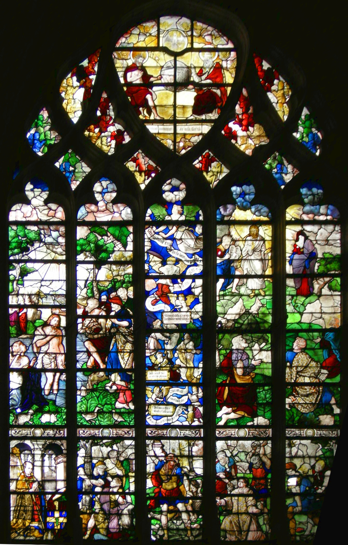 Versione raddrizzata dell'immagine originale